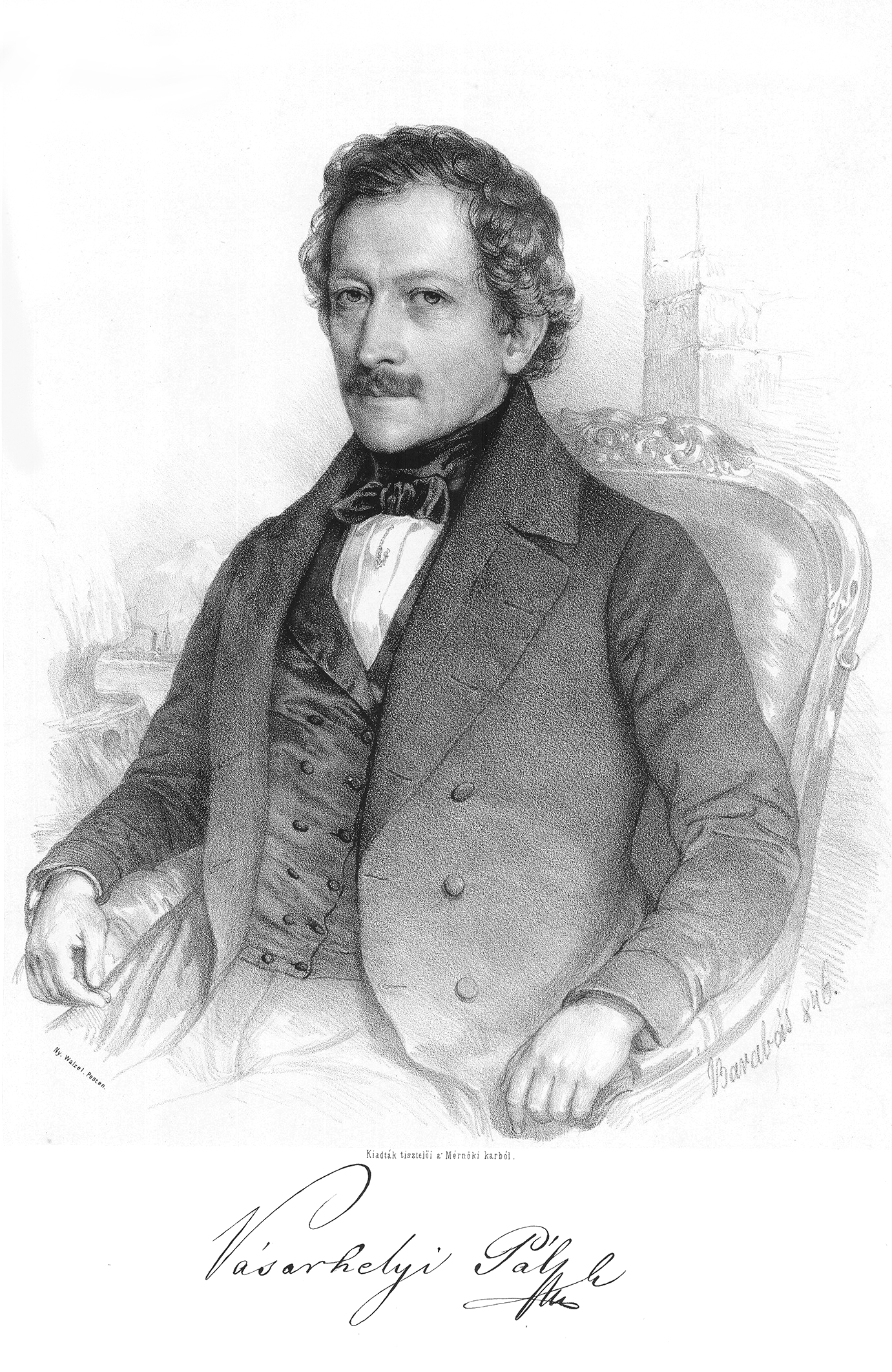 Vásárhelyi Pál (1795–1846) vízépítő mérnök, a Magyar Tudományos Akadémia rendes tagja portréja. Barabás Miklós litográfiája